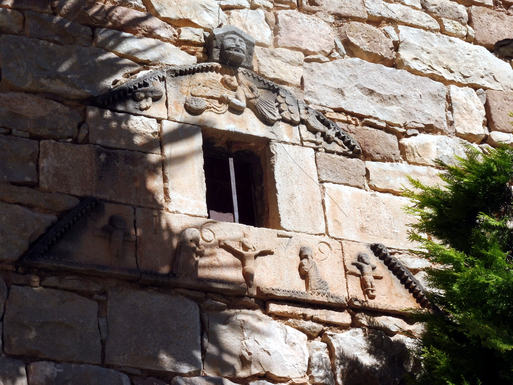 Església de Sant Iscle i Santa Victòria de Rajadell: finestra decorada